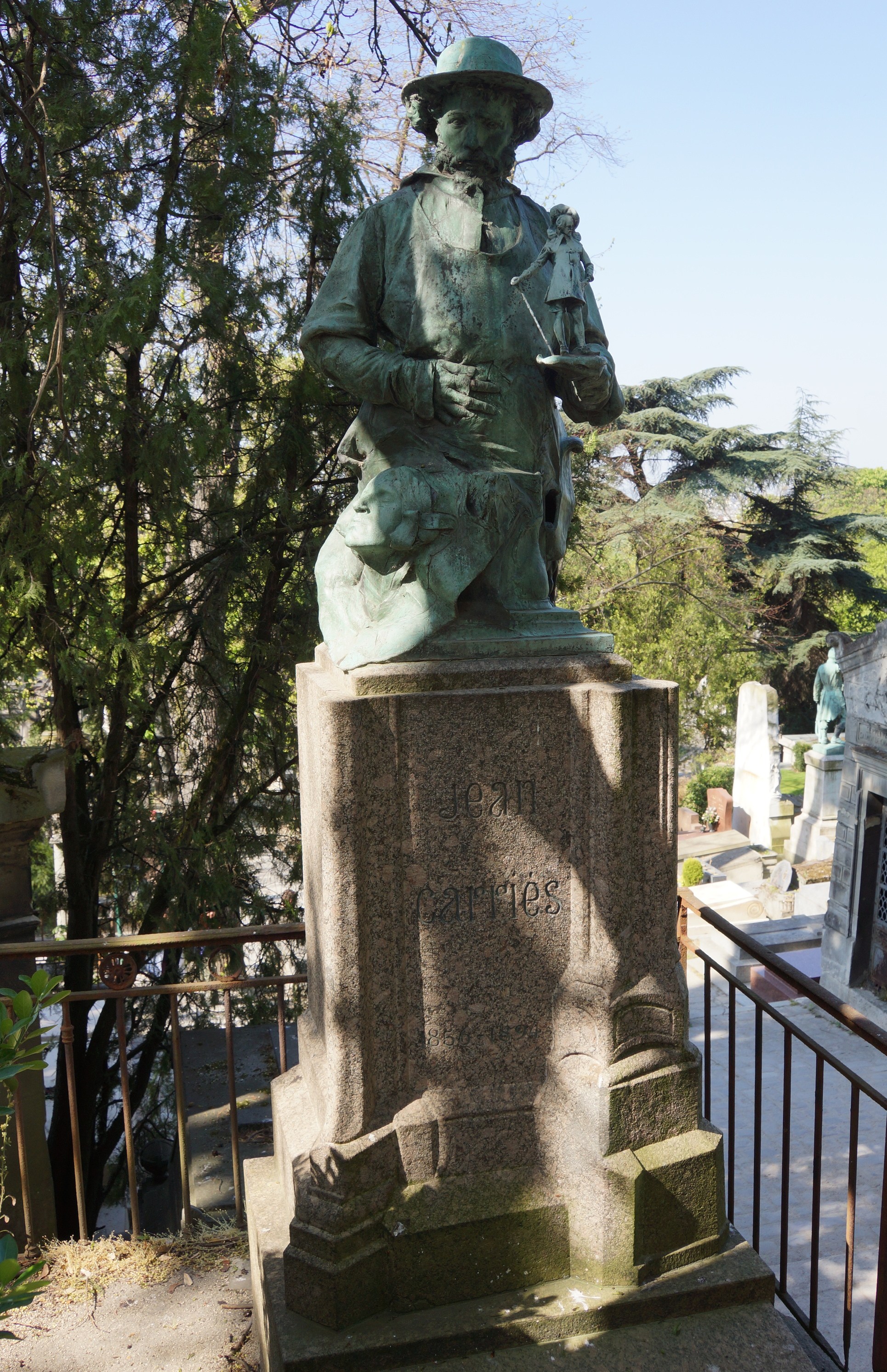 Grabmal von Jean-Joseph Carriès auf dem Pariser Friedhof Père Lachaise